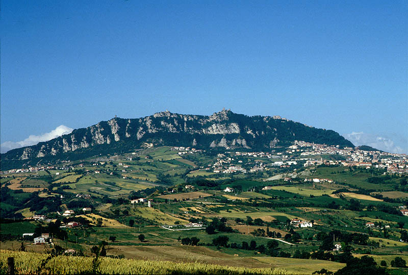 Monte Titano, Repubblica di San Marino